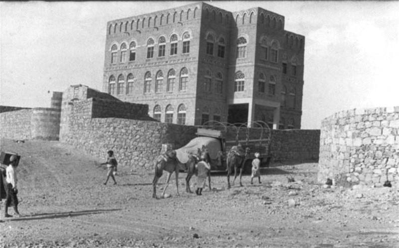 Soviet embassy in Taiz, Yemen